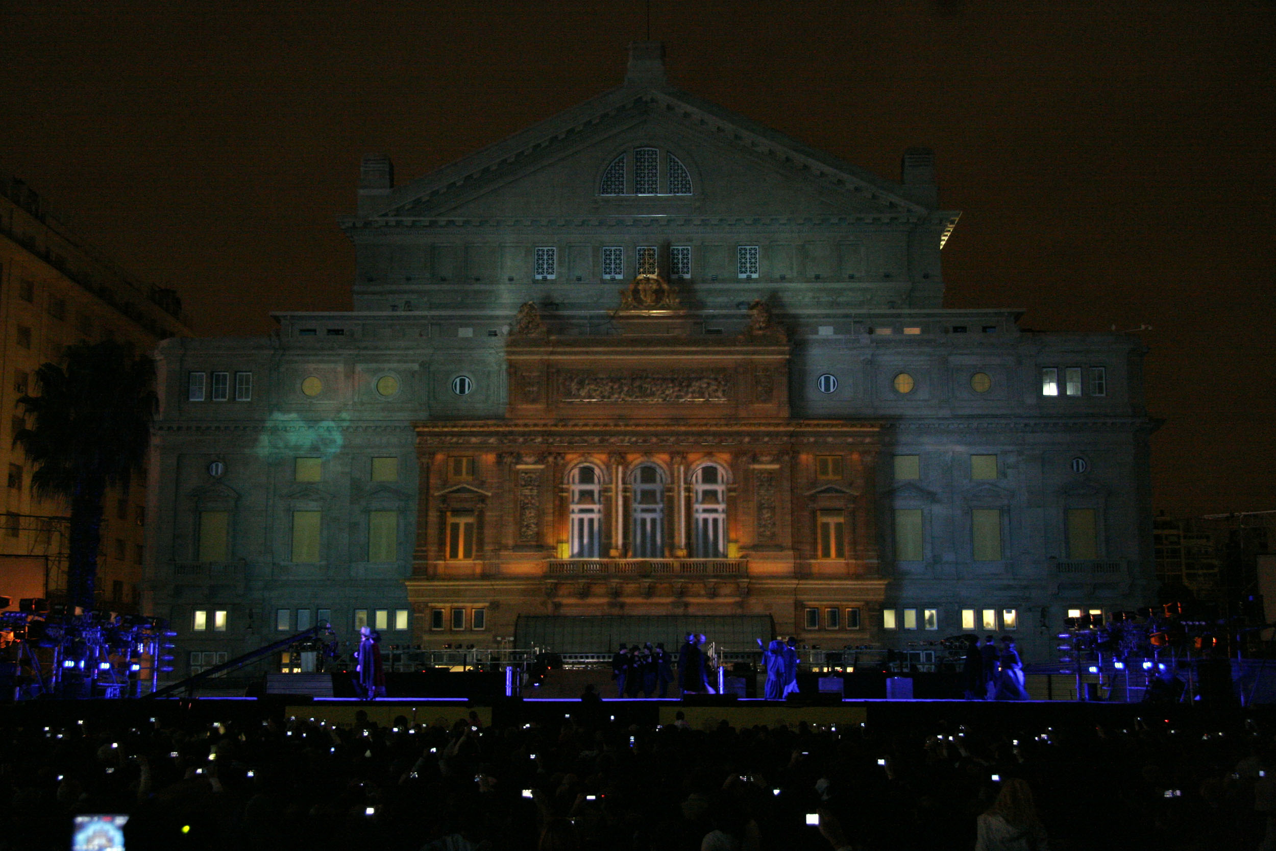 Gala de reapertura del Teatro Colón. Vista exterior del Teatro.